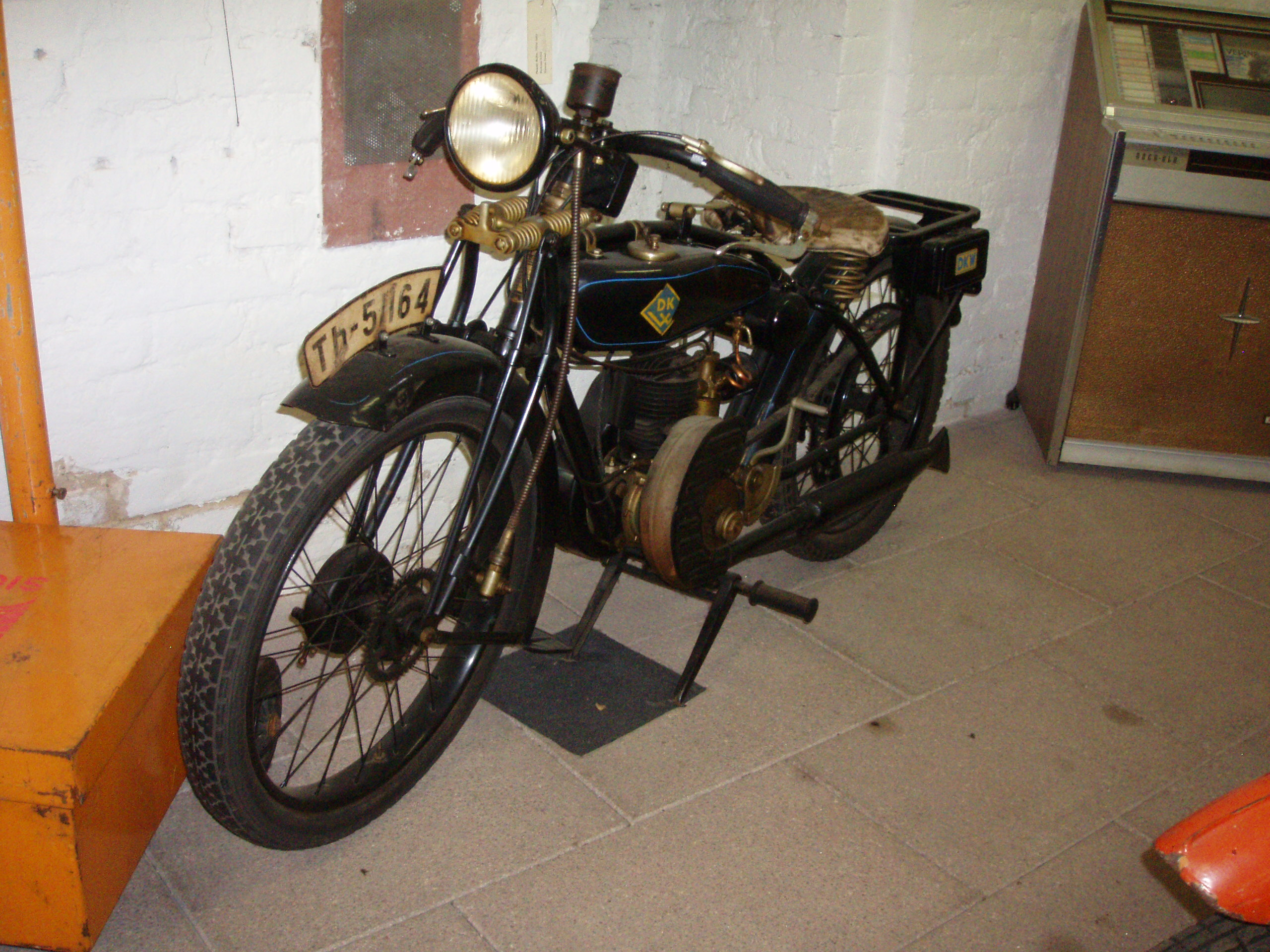 DKW-Motorrad